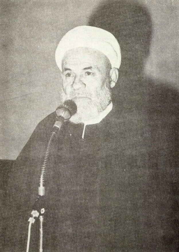 العلامة الشيخ حسين معتوق العاملي